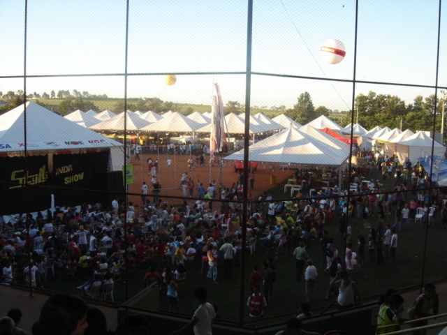 Festa Japonesa em Marília, São Paulo, Brasil.